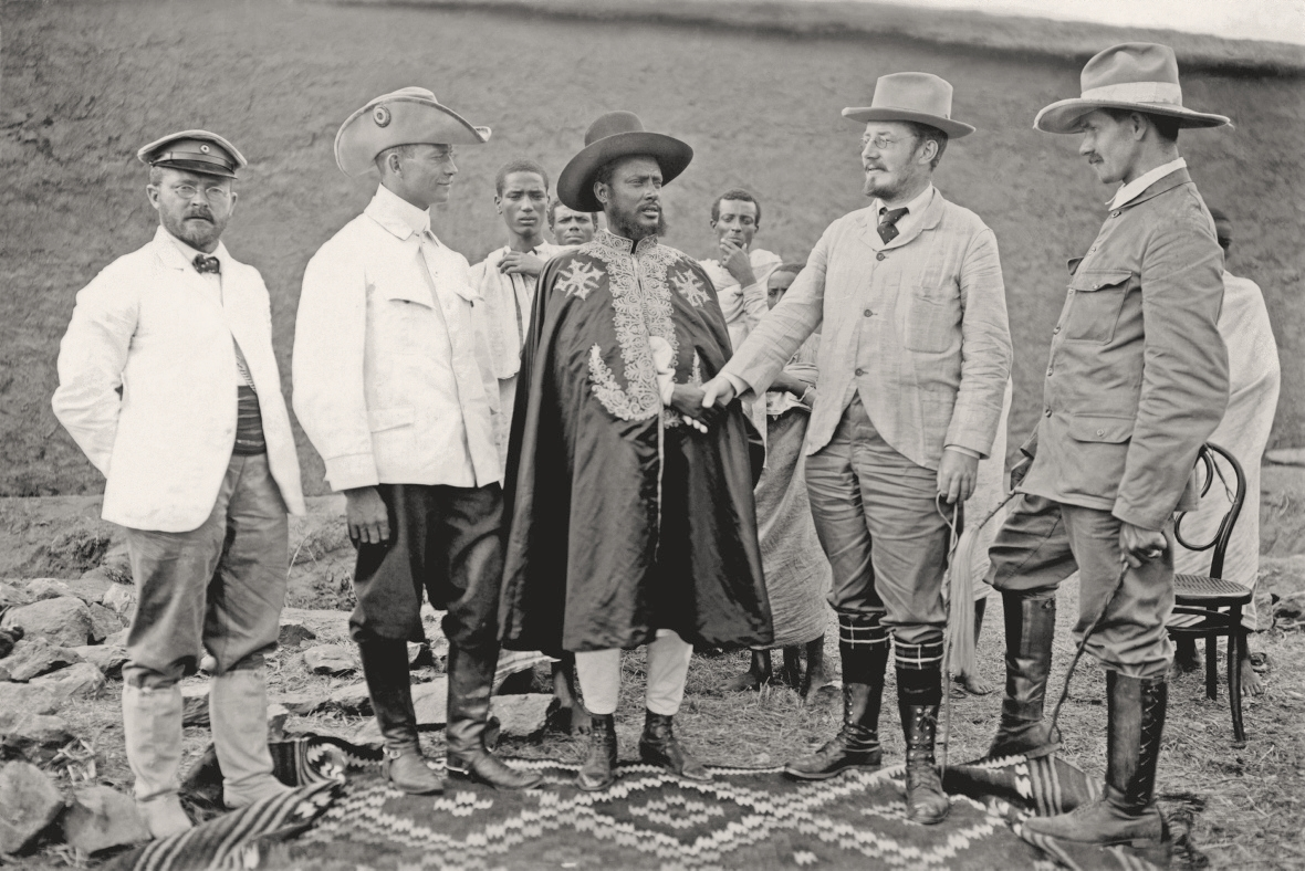 Teilnehmer der Deutschen Aksum Expedition im Februar 1906 in Aksum. Von links: Theodor von Lüpke, Mitarbeiter, ab 1911 Leiter der Königl. Preußischen Messbild-Anstalt Berlin, später Staatliche Bildstelle, Berlin; Dr. Kaschke (Kolonial-) Arzt und Sammler zahlreicher Ethnologica, Flora und Fauna etc.; Gebre Selassie, Gouverneur der Provinz Tigre, Verwandter Kaiser Meneliks II und Beschützer der Expedition sowie Enno Littmann und Daniel Krencker.